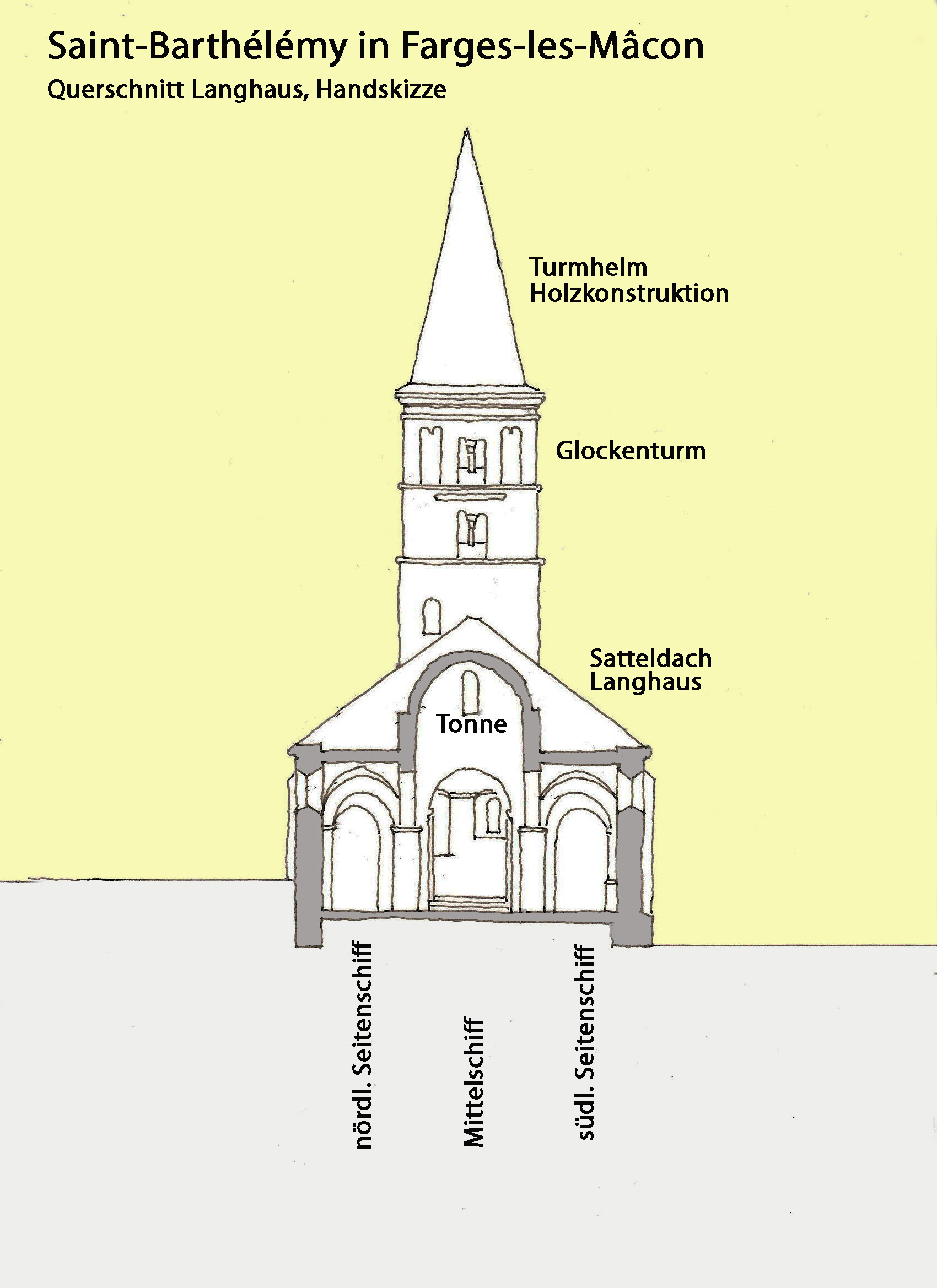 St-Barthélémy,_Farges,_Querschnitt.